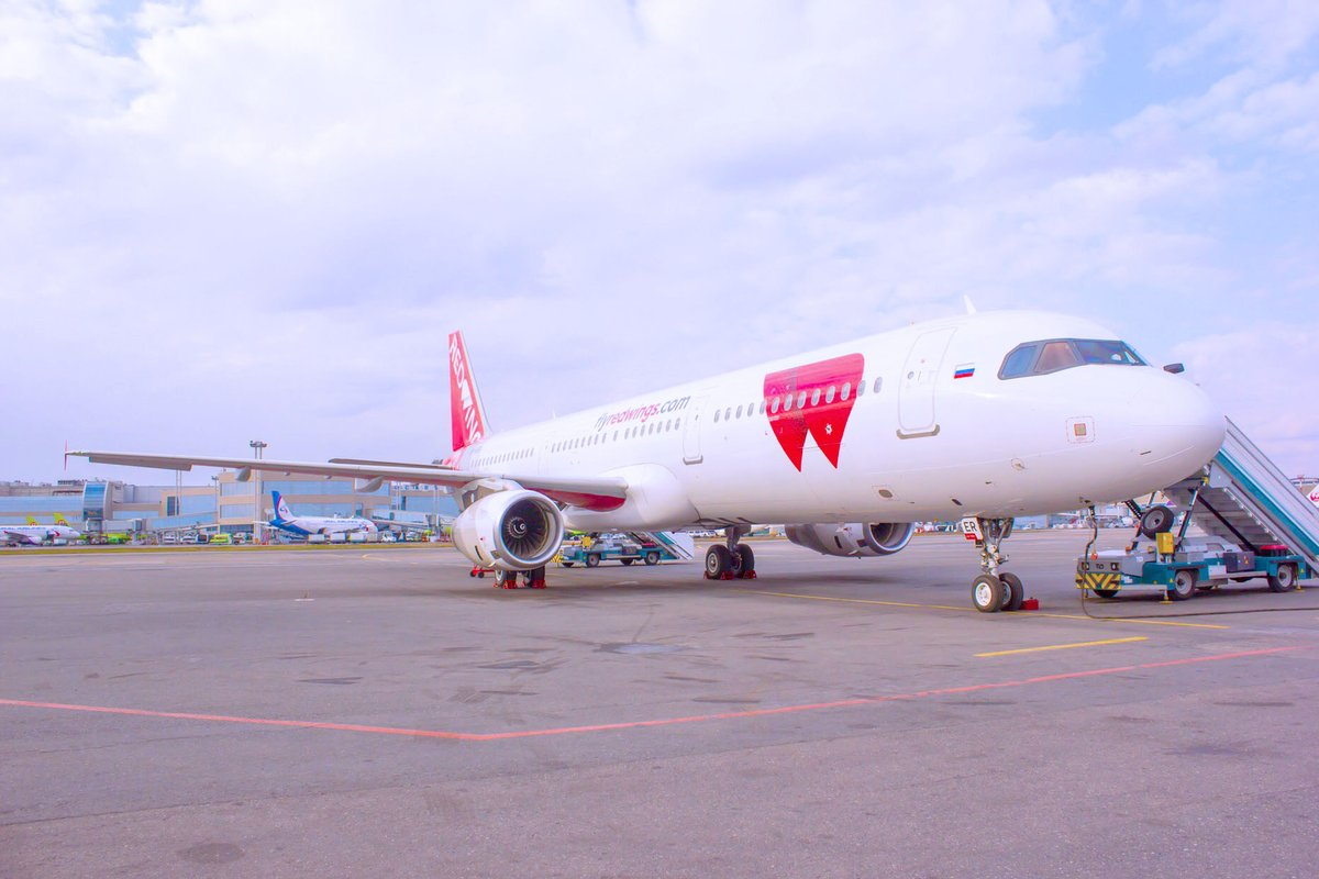 новый вс ред вингс